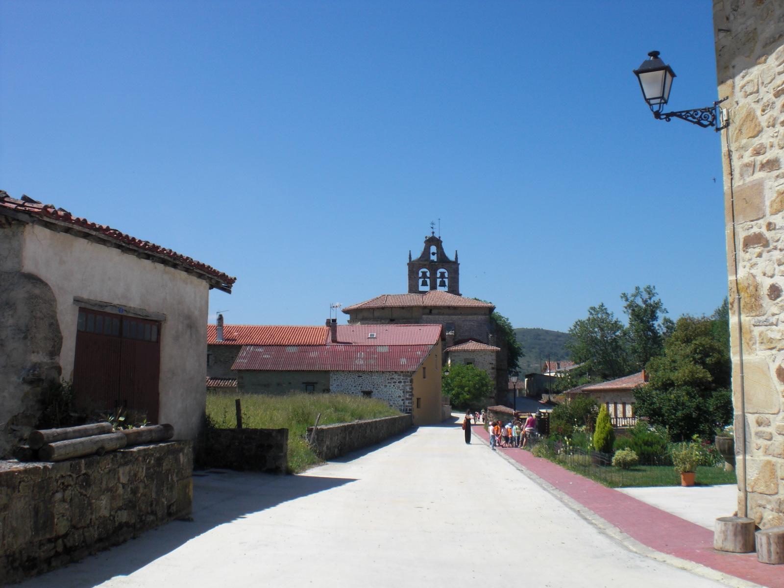 Donemiliagako Axpururen ikuspegia.